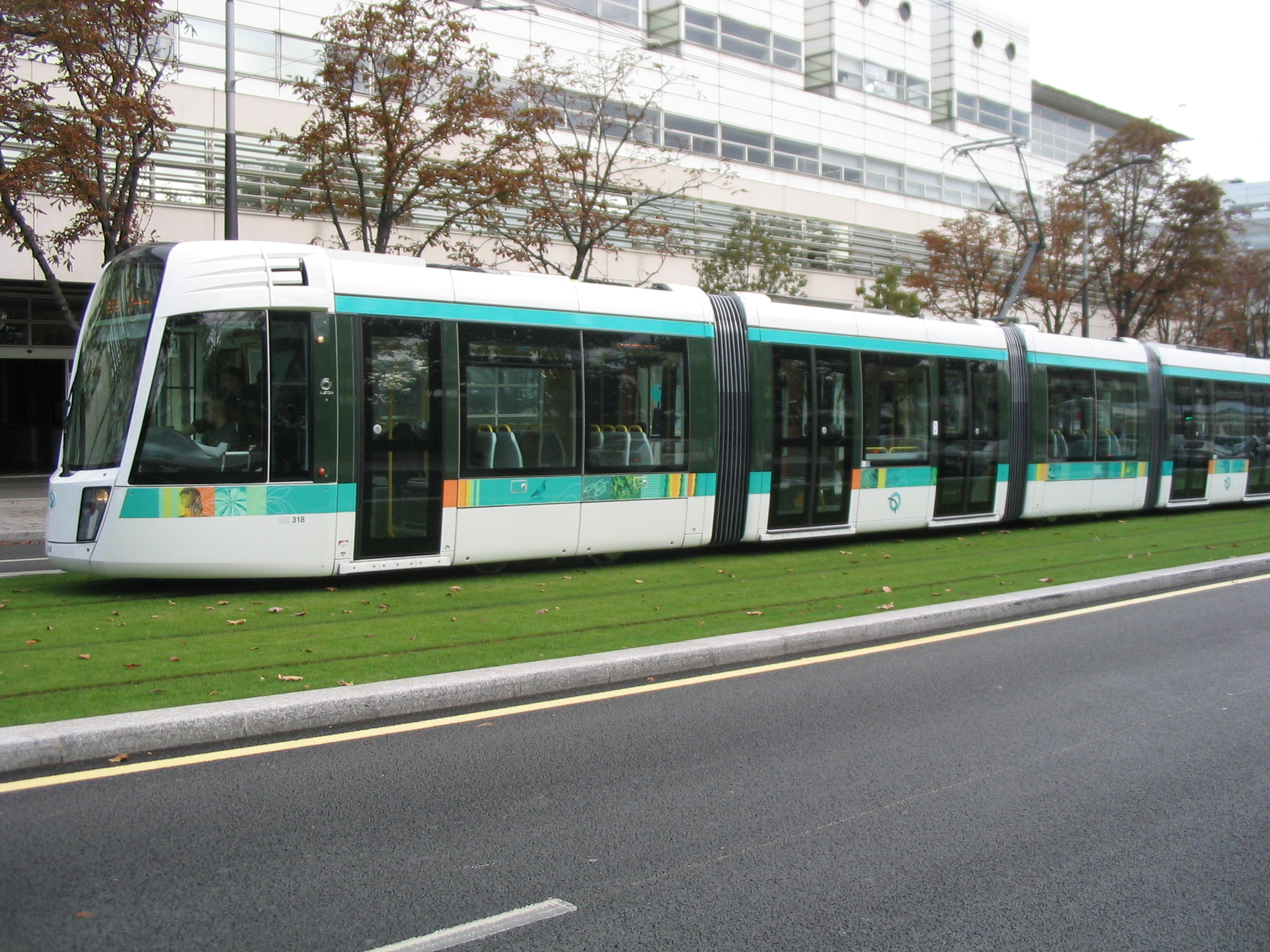 Une rame du tramway parisien T3 en cours de test entre les stations Pont de Garigliano et Balard.